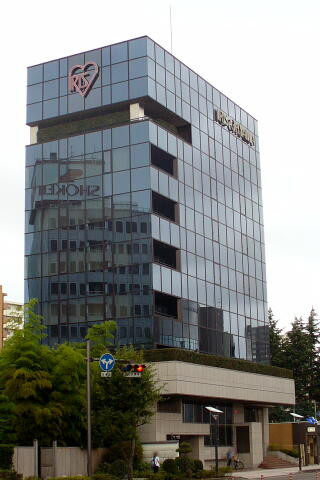 アイリスオーヤマ本社